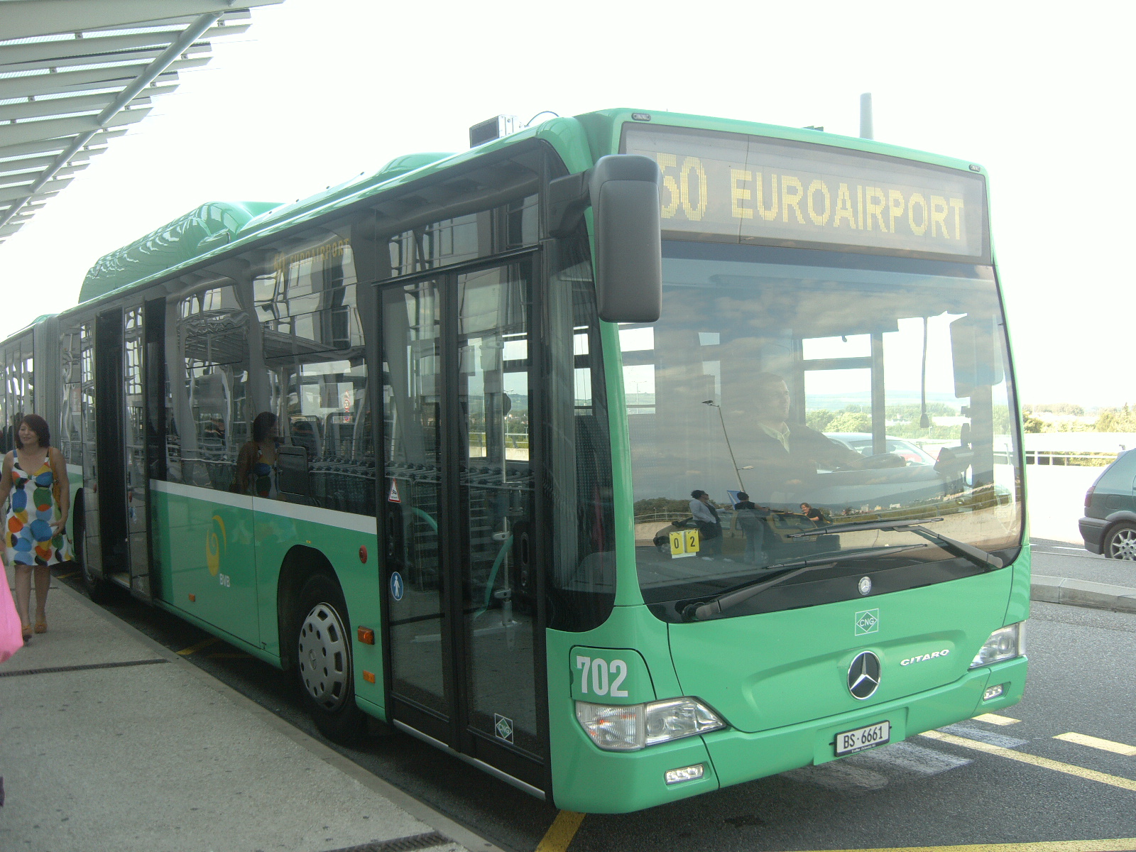 Bus de la ligne 50 des BVB (Compagnies des Transports Bâlois) à l'EuroAirport (au niveau départ, côté suisse)